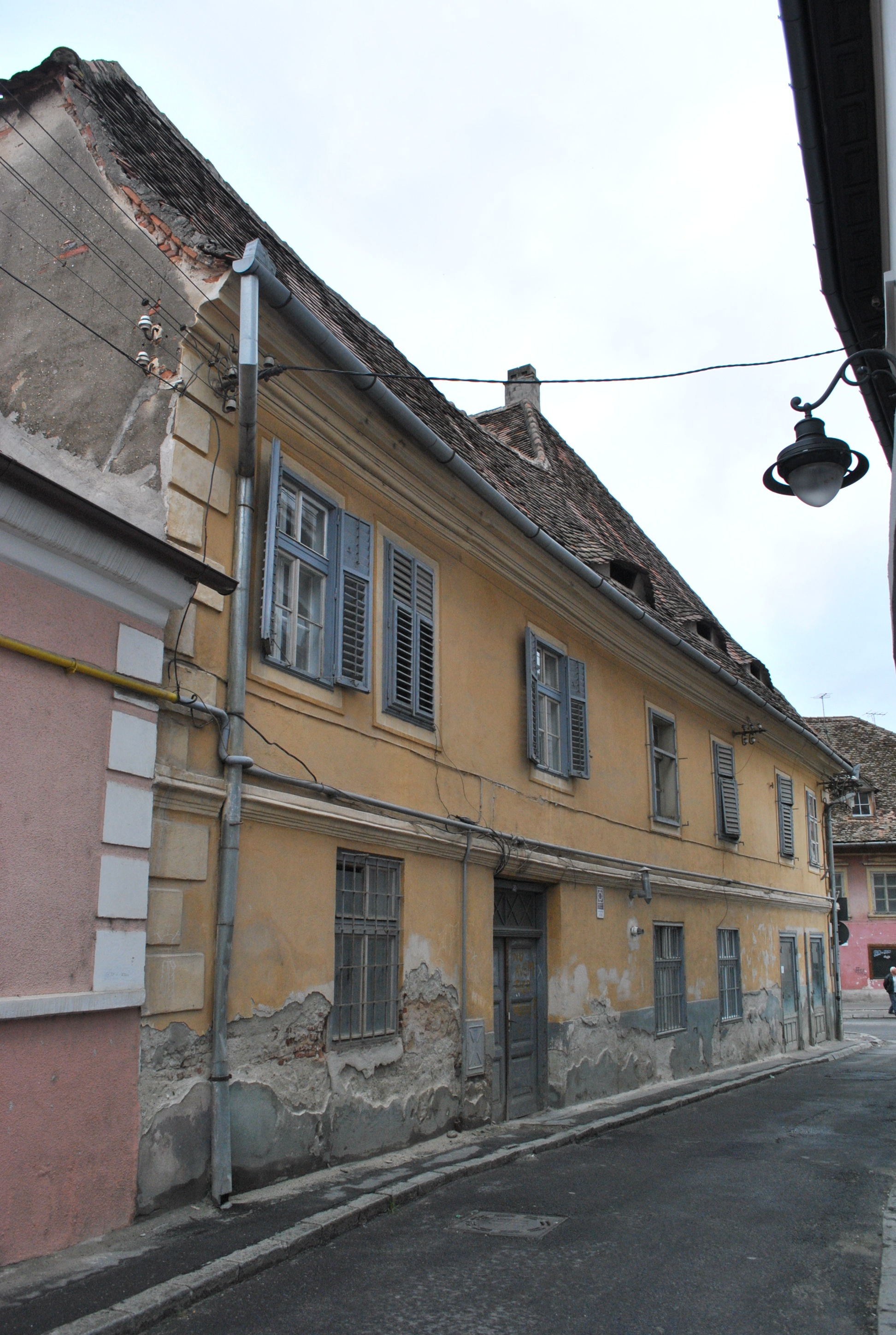 Casă, sec. XVI - XVII, 1827